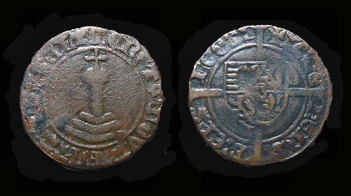 Monnaie en bronze liégeoise du Prince Evêque Jean de Heinsberg (1396-1459)